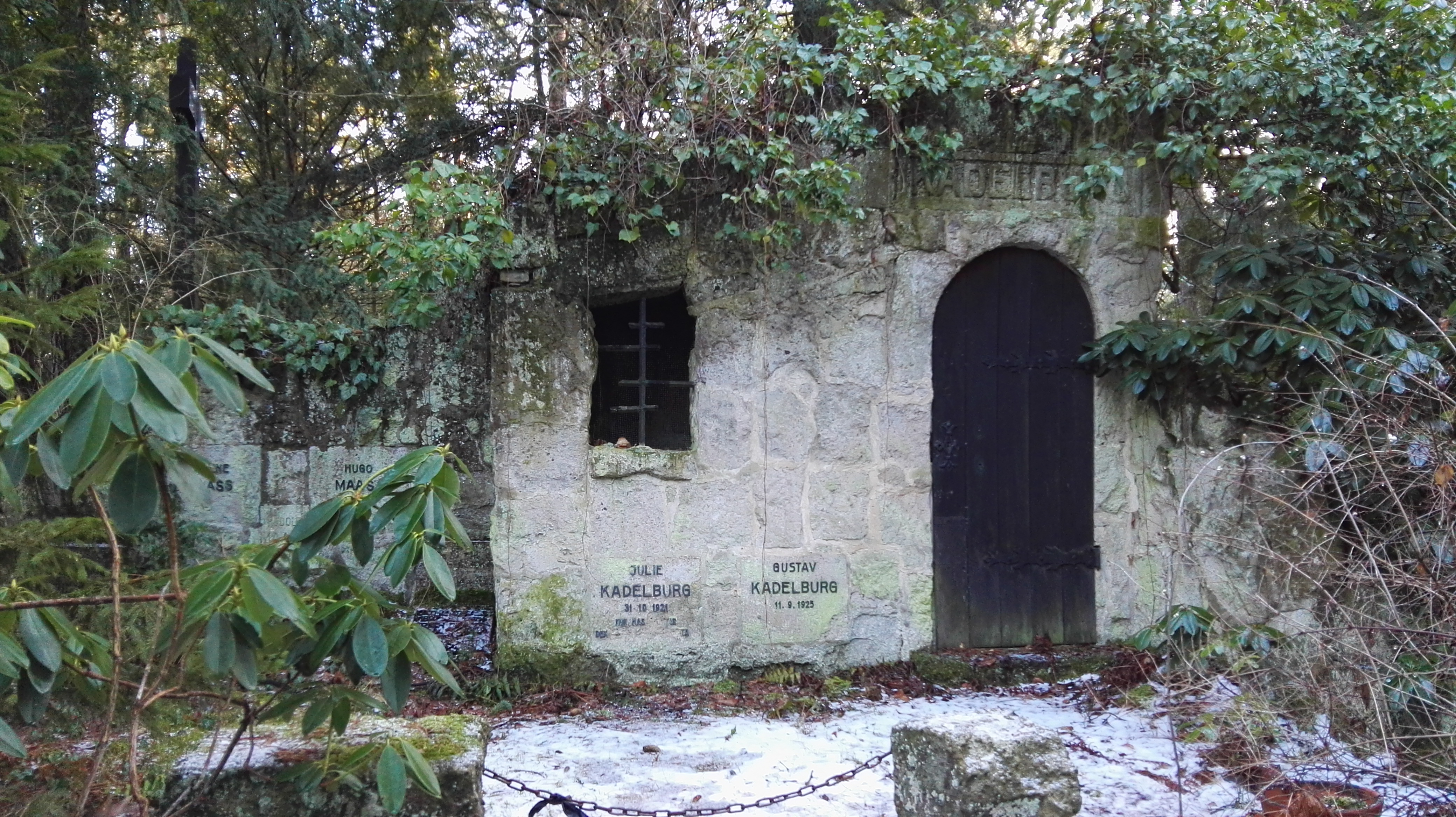 Grab von Gustav Kadelburg auf dem Südwestkirchhof Stahnsdorf; als Burg gestaltet